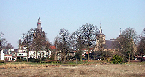 Gezicht op Ginneken. Zelf gemaakt, GFDL